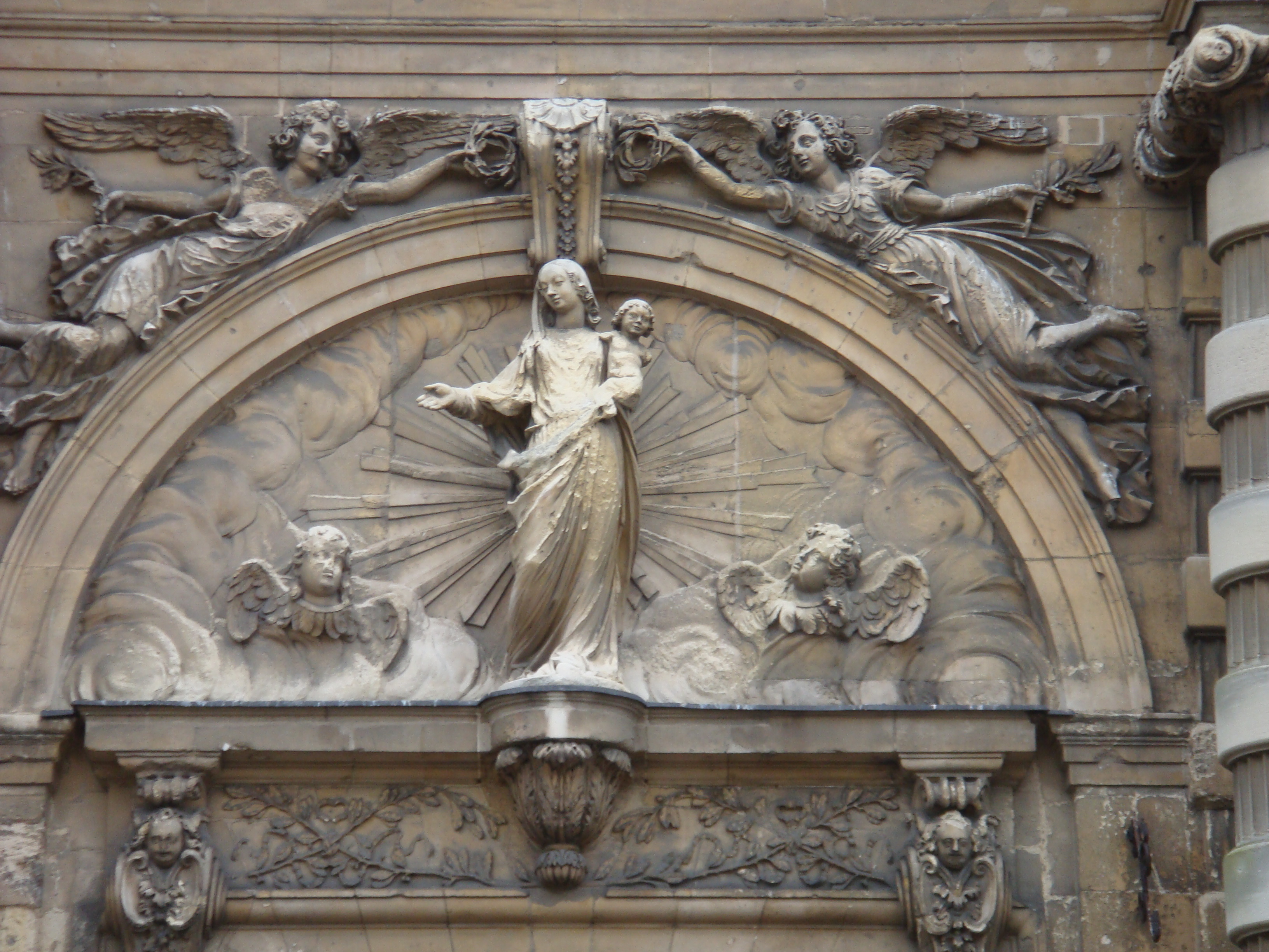 Thympan à l'entrée principal représentant la Vierge Marie tenant l'Enfant Jésus, au ciel entourée d'ange.